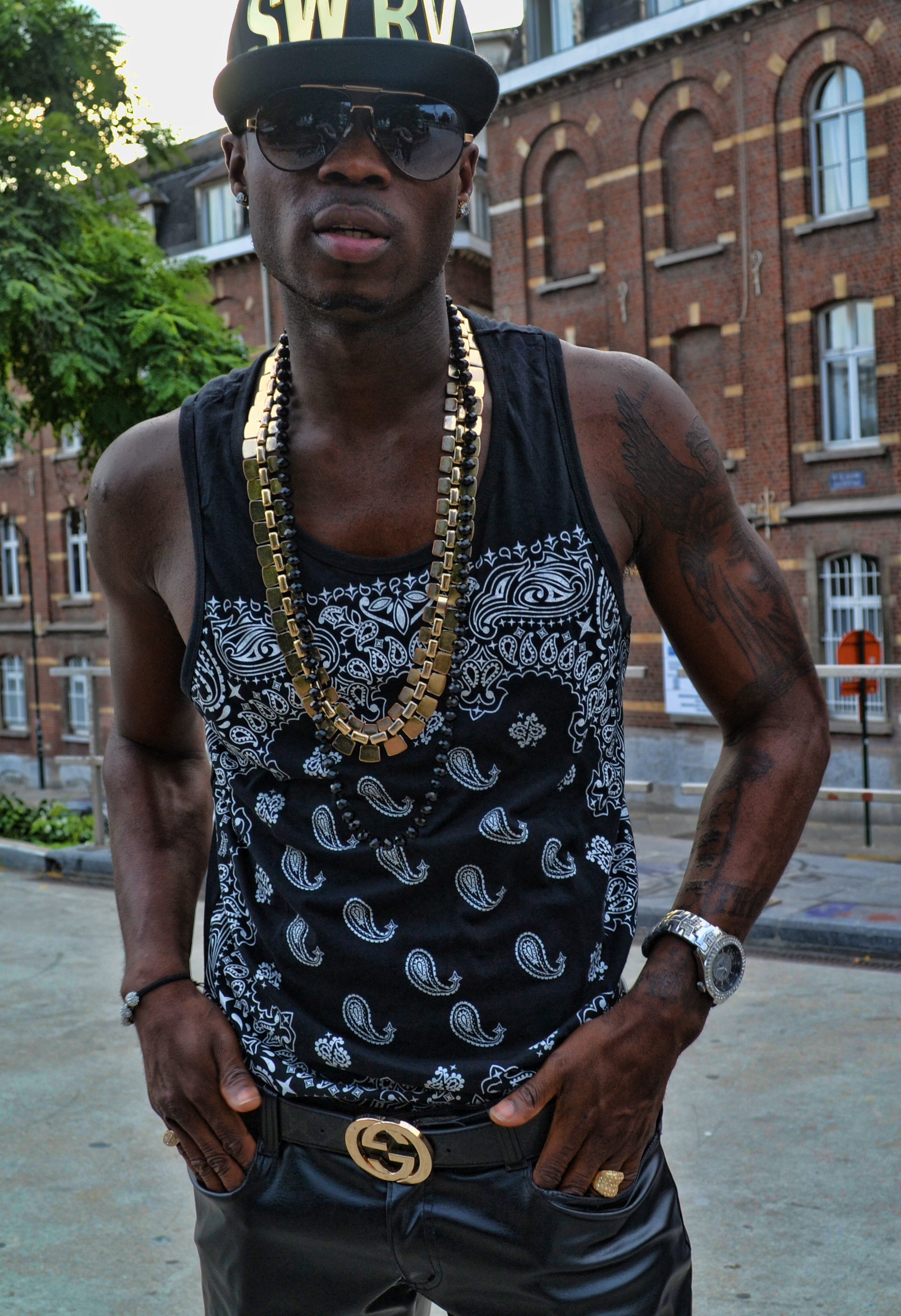 Kaye Styles in Europe/ Taken With Nikkon D3100.